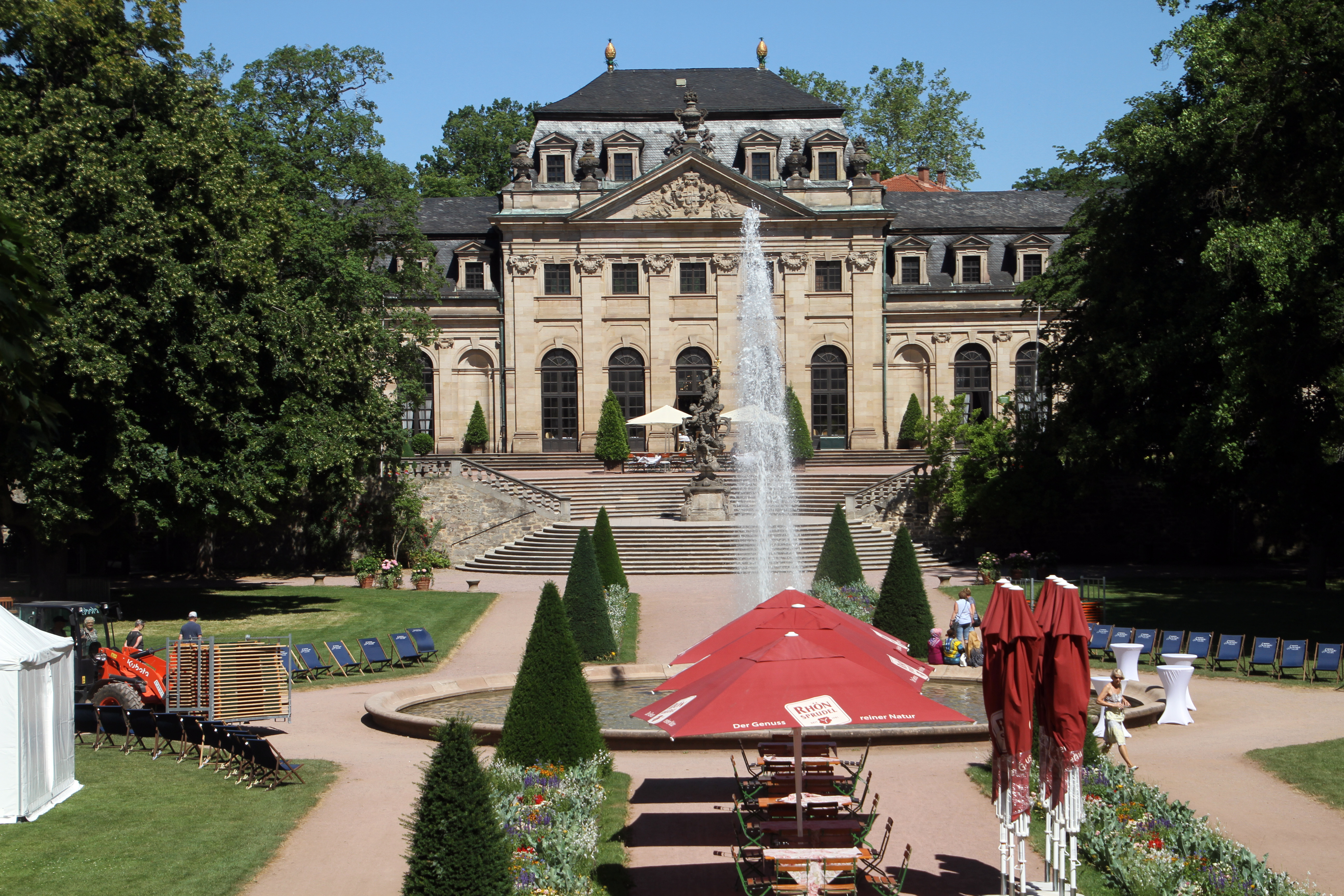 Orangerie Fulda